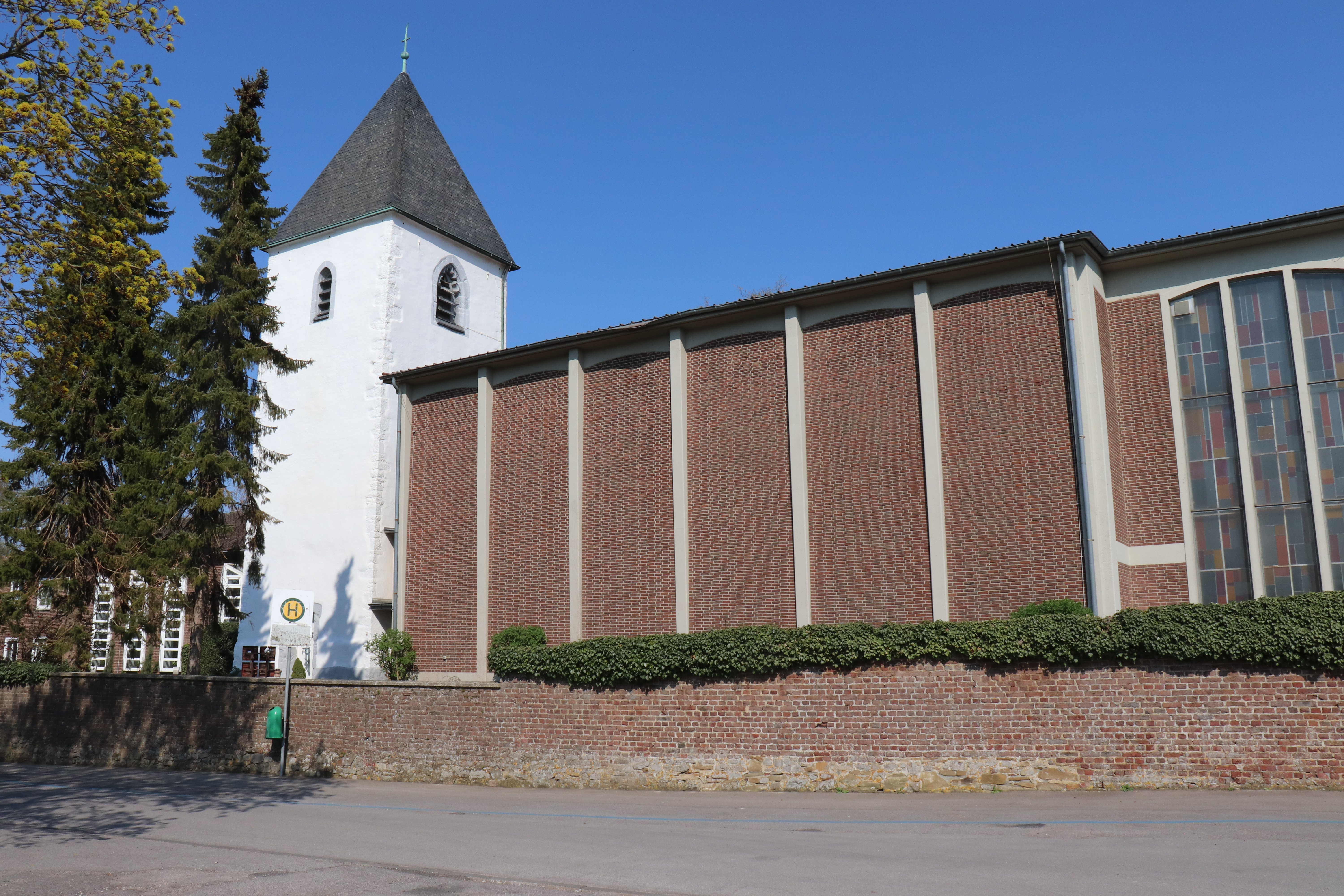 Die Klosterkirche mit Kirchturm.